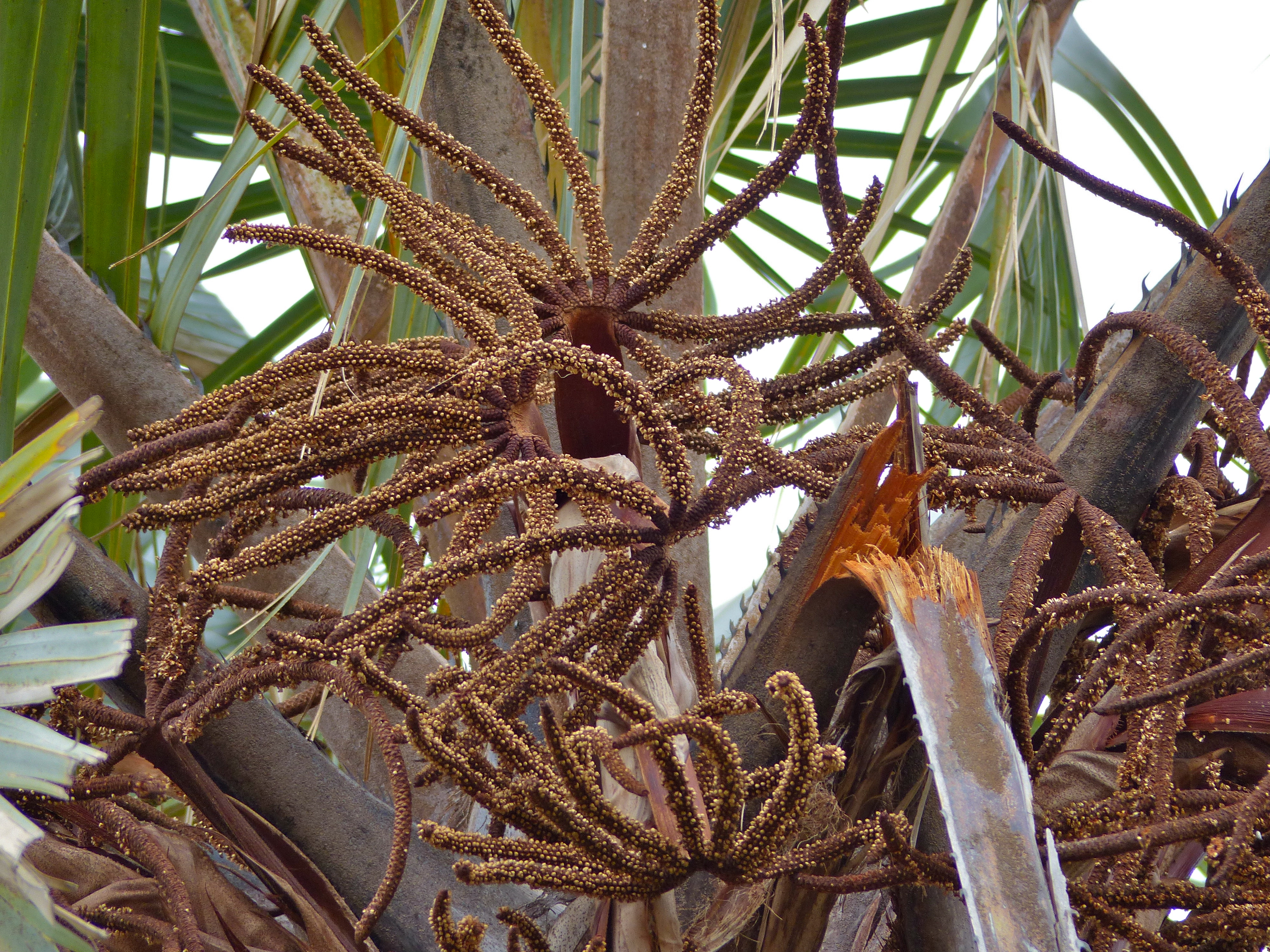 S63 Road, Pafuri area, Kruger NP, SOUTH AFRICA